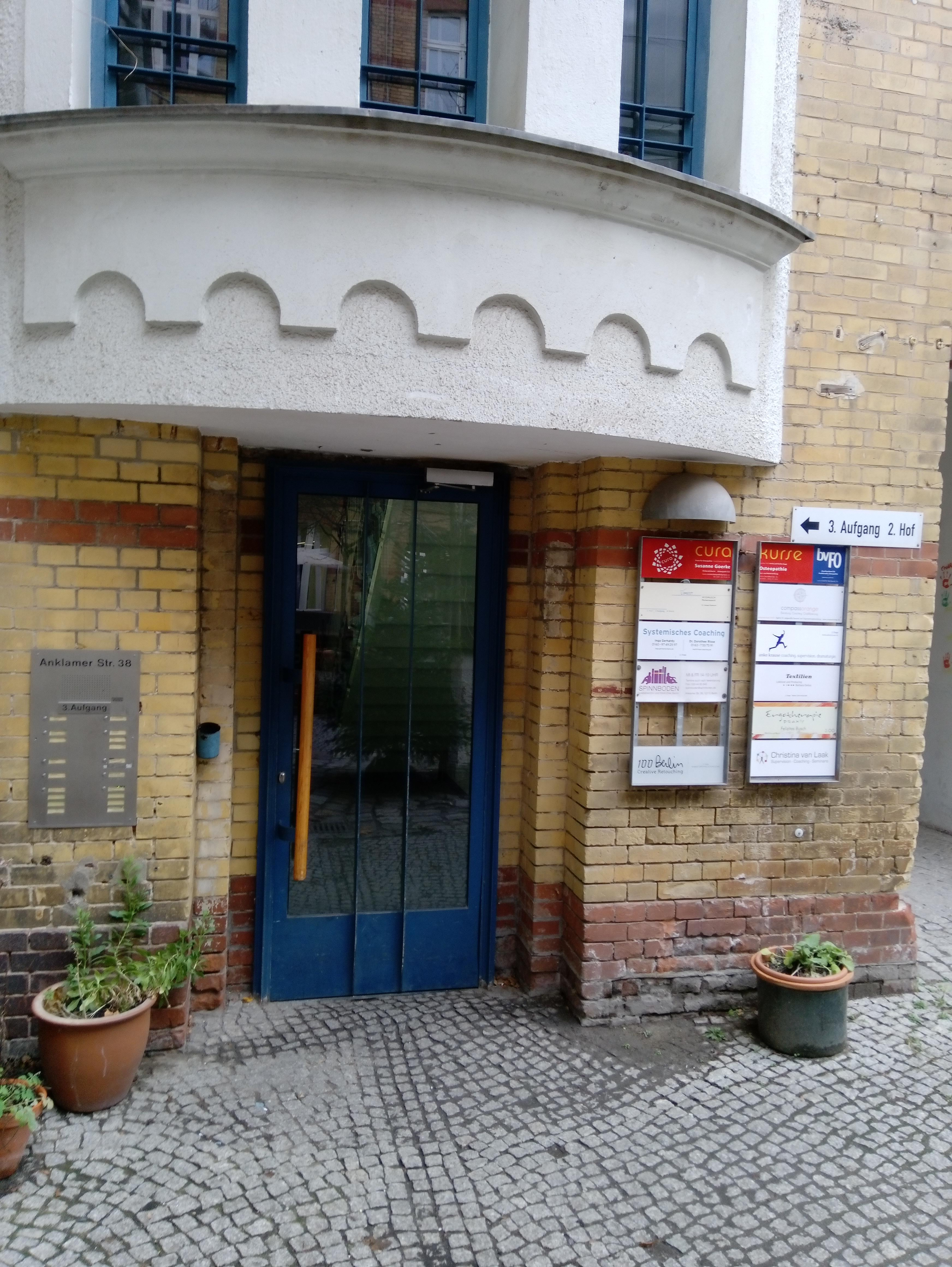 Eingang Spinnboden Lesbenarchiv 2. Hof Anklamer Straße 38, 10115 Berlin